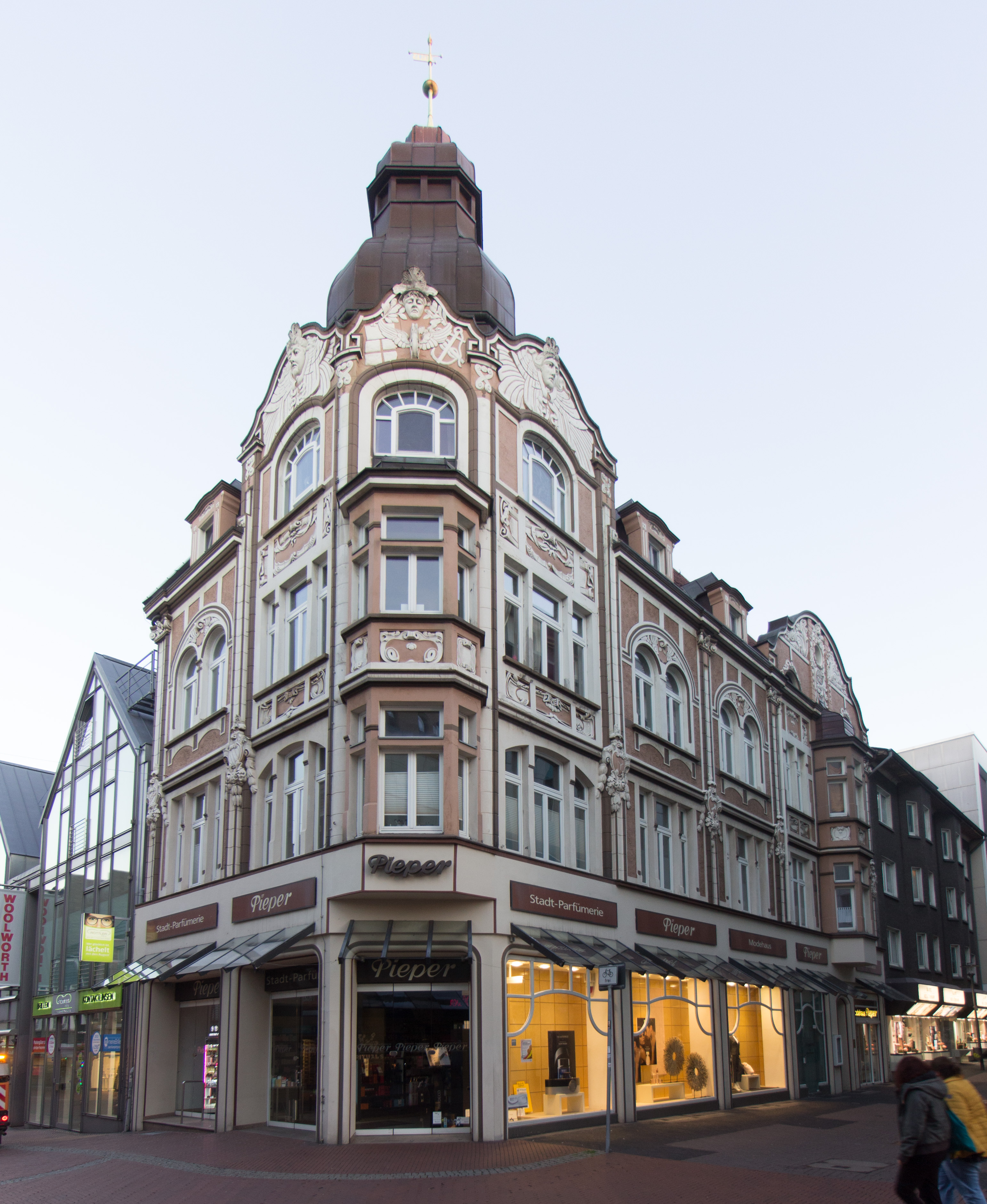 Recklinghausen Monument 129 Gründerzeithaus, Kunibertistr 4This is a photograph of an architectural monument., no. 129